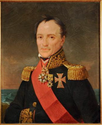 L'amiral Emmanuel Halgan (1771-1852)